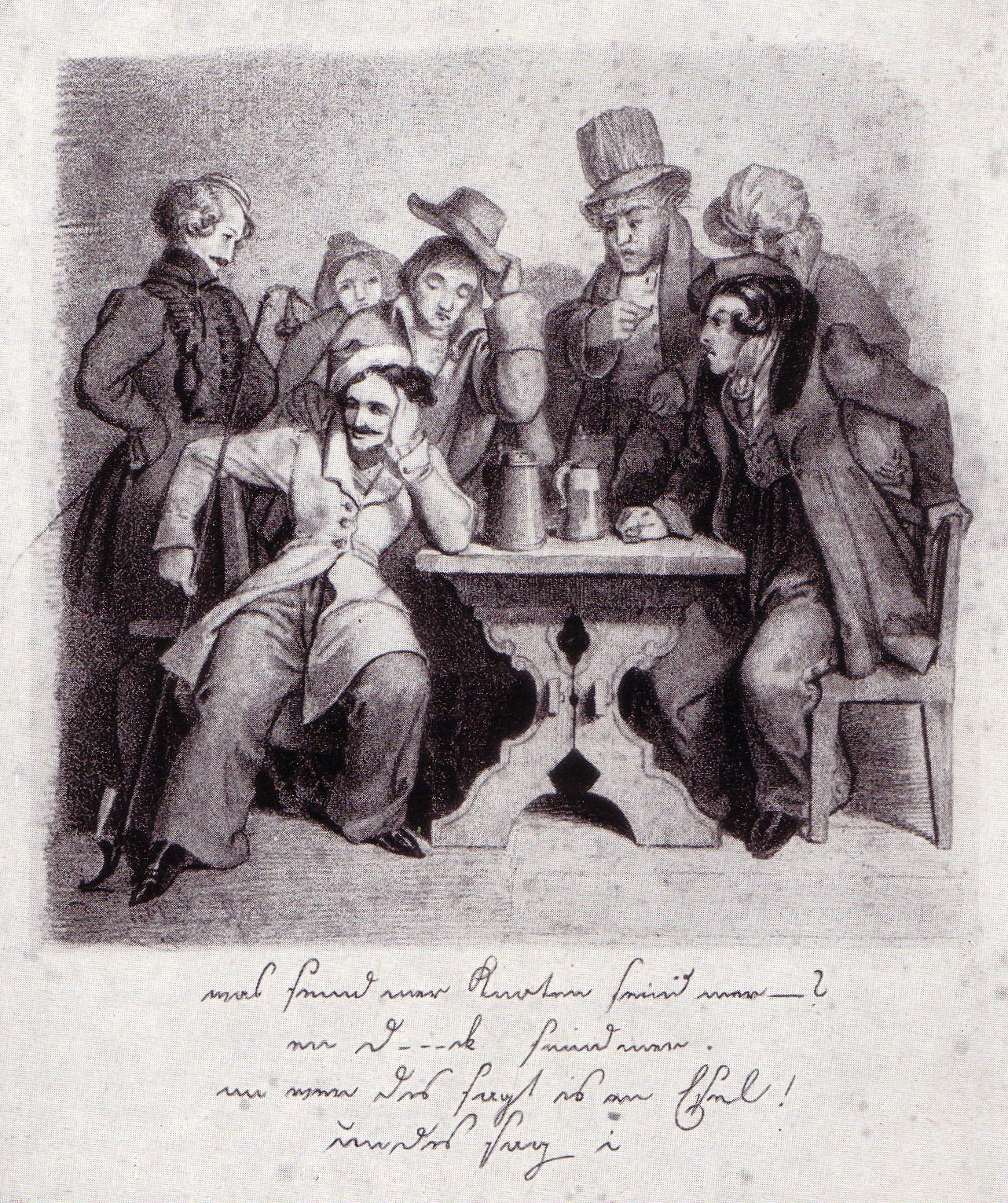 Die handschriftliche Legende lautet: "was seind mer, Knoten seind mer? een D--eck seind mer un wer des sagt, is en Esel! un des sag i". In einem Wirtshaus haben zwei Studenten (links) ehrbare Bürger als "Knoten" bezeichnet. Das niederdeutsche Wort war eine despektierliche Bezeichnung für Handwerksburschen. Die Begebenheit soll sich in Heidelberg zugetragen haben. Philipp von Foltz hat sie ins Münchener Milieu verlegt.